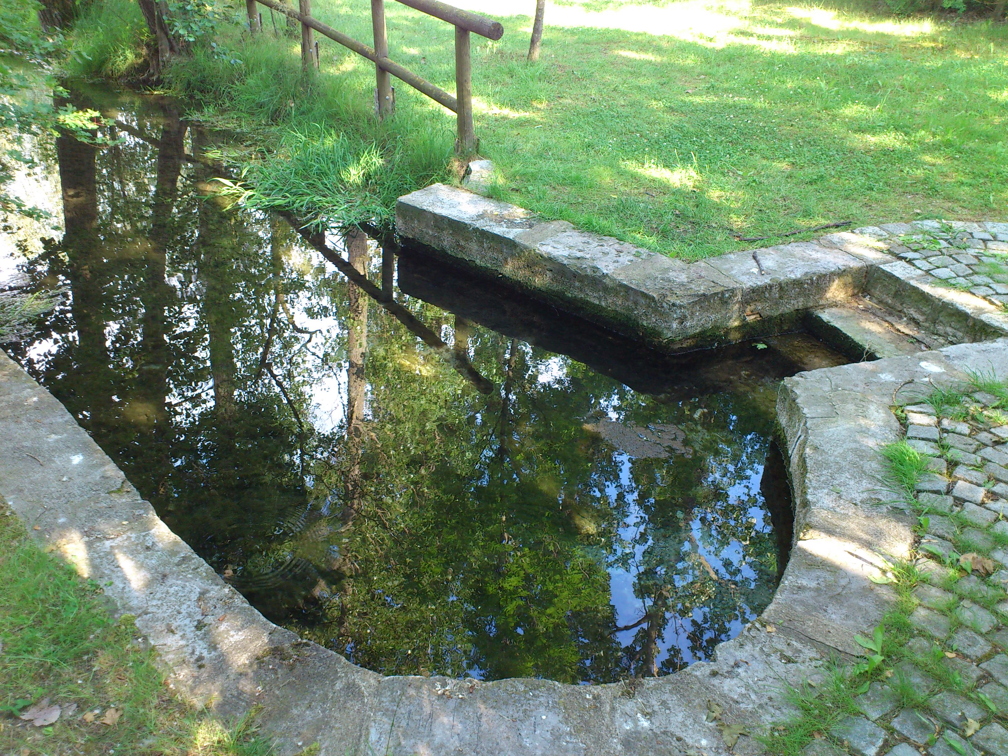 Die Aischquelle